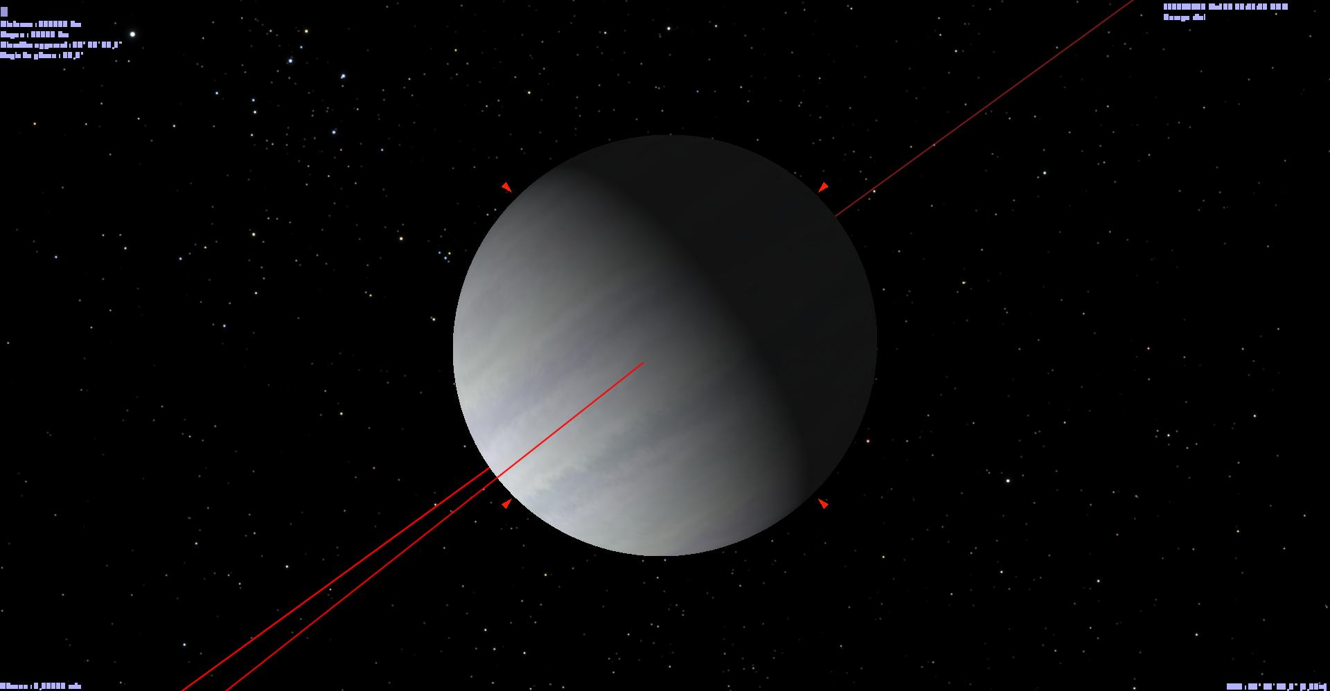 Gliese 3021 b vu dans Celestia